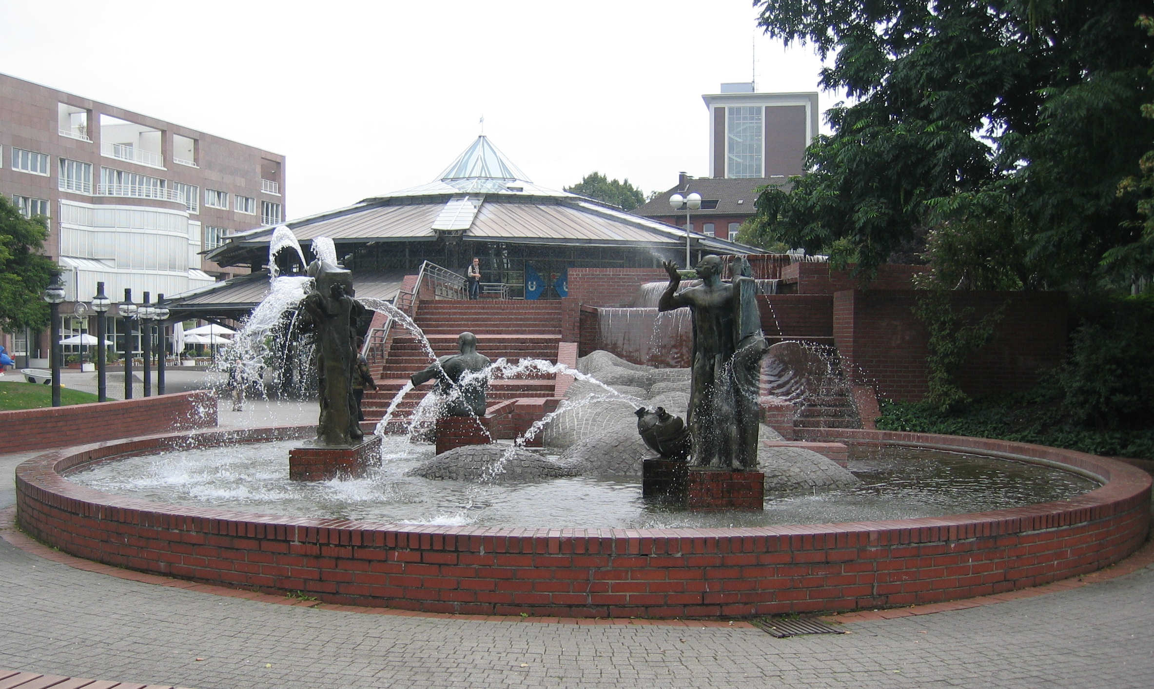 Gauklerbrunnen von Eberhard Linke, Stadtgarten Dortmund own work August 2006